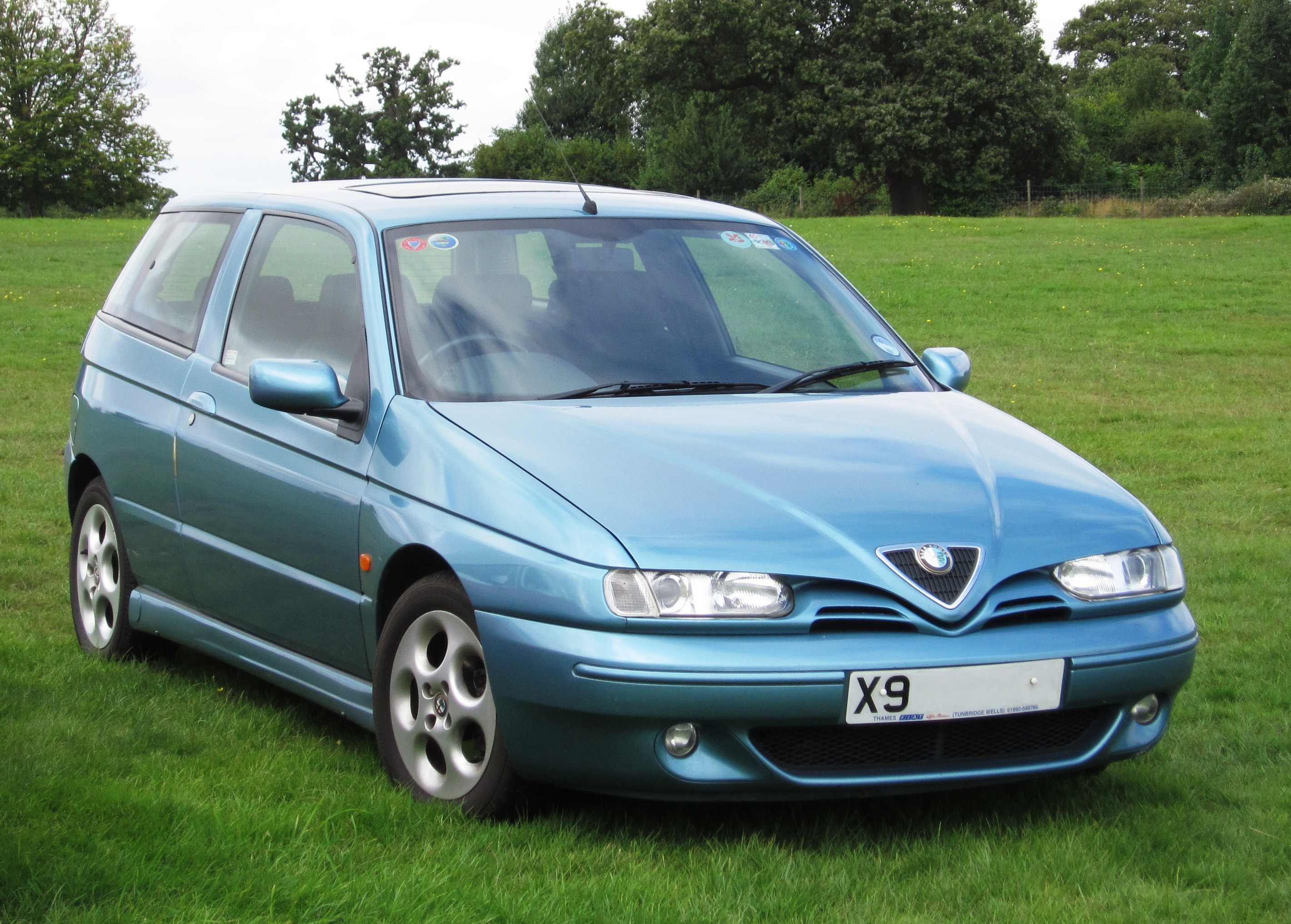 Alfa Romeo 145 a Knebworth, GB